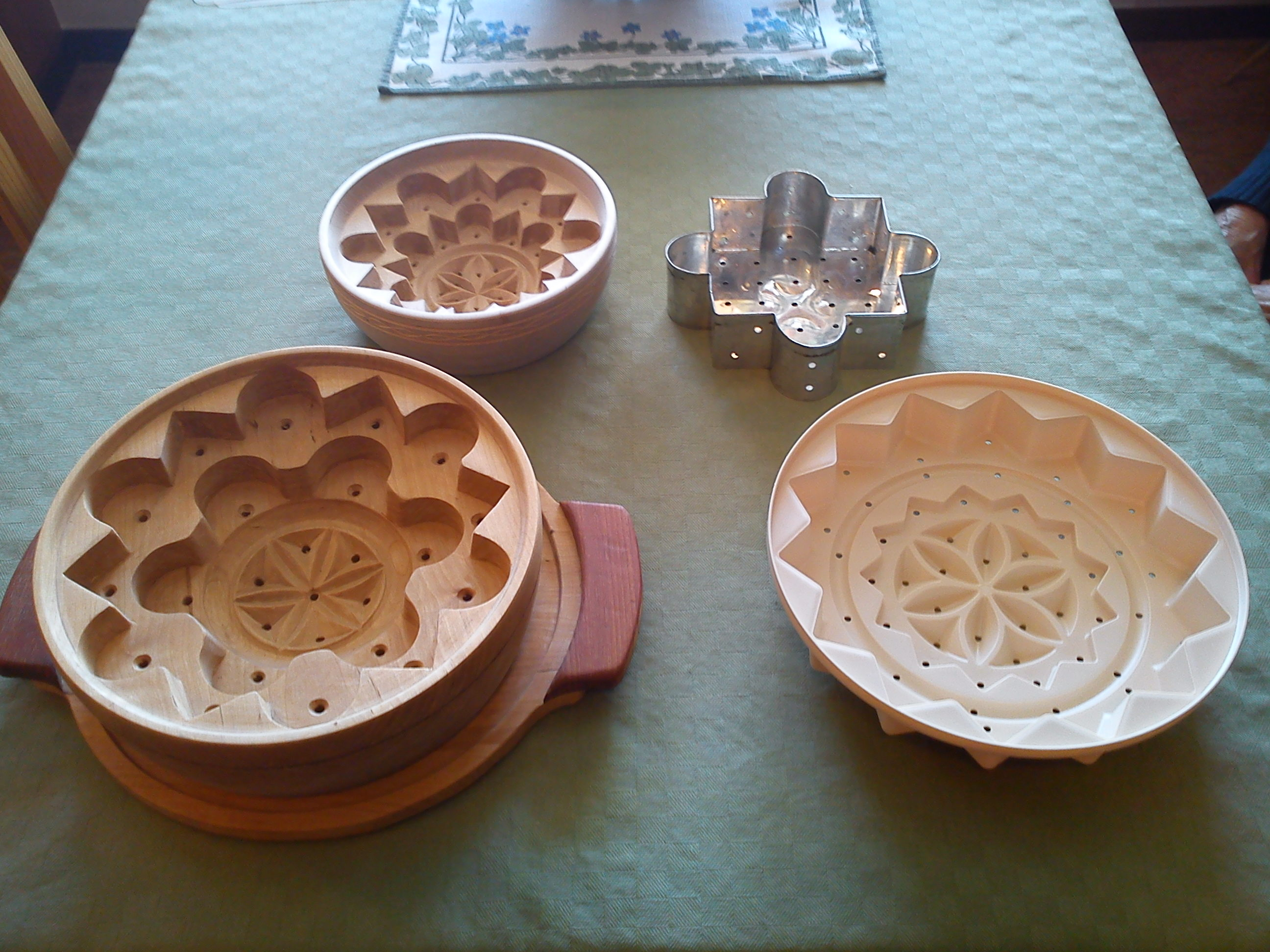 Äggostformar i olika utförande. Till vänster två snidade formar i björk, till höger en i förtennad plåt och en i polypropen.